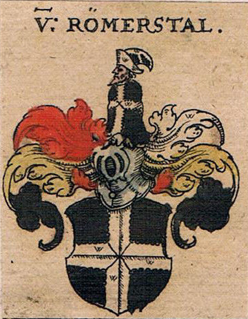 Wappen von Römerstal (de Rambévaux), aus Siebmacher (1605).